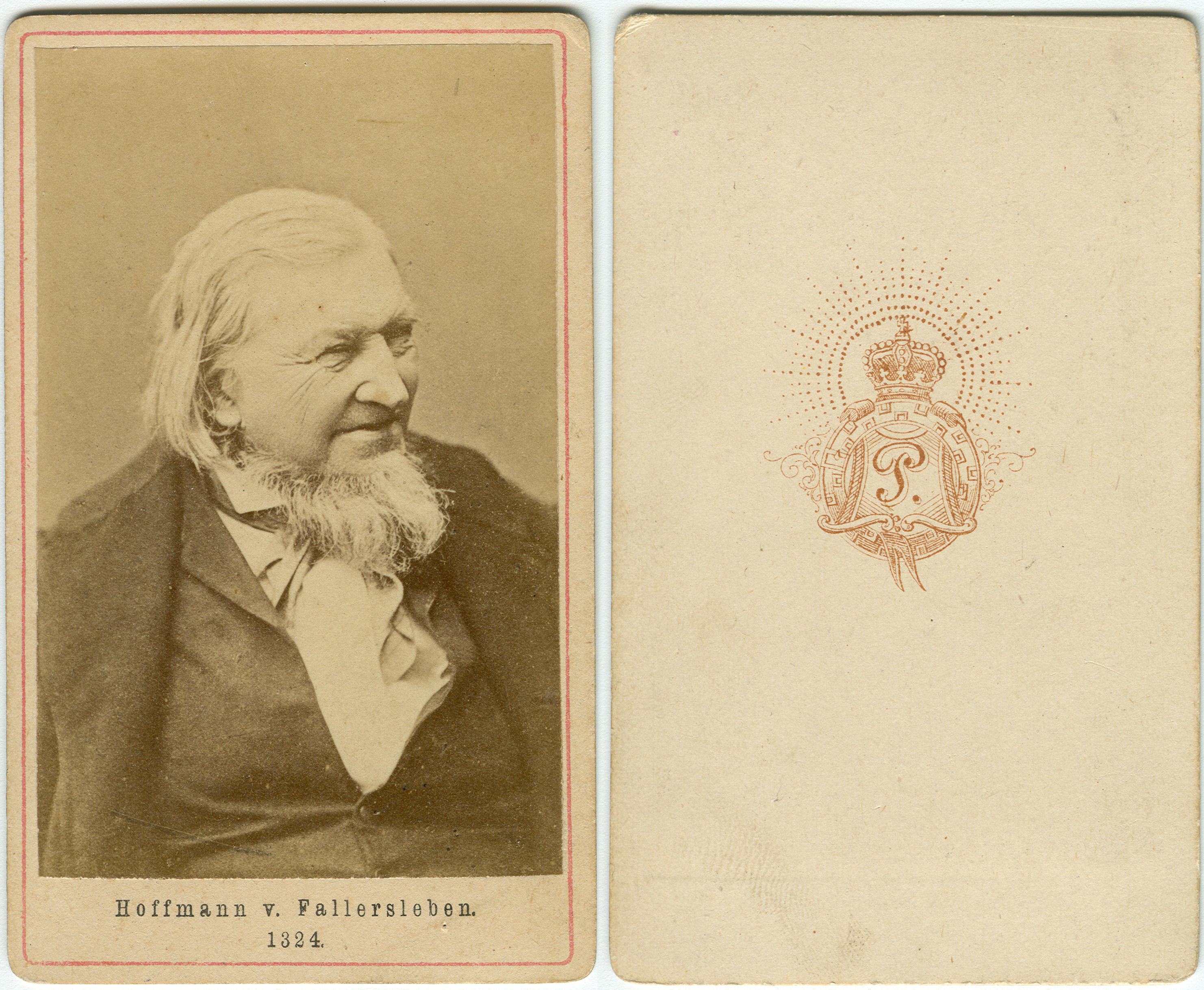 unidentifizierter Fotograf oder Verlag "P": Hoffmann v(on) Fallersleben.; Albuminfotografie mit der (laufenden Bestell-?) Nummer "1324."; um 1860 - Privatbesitz